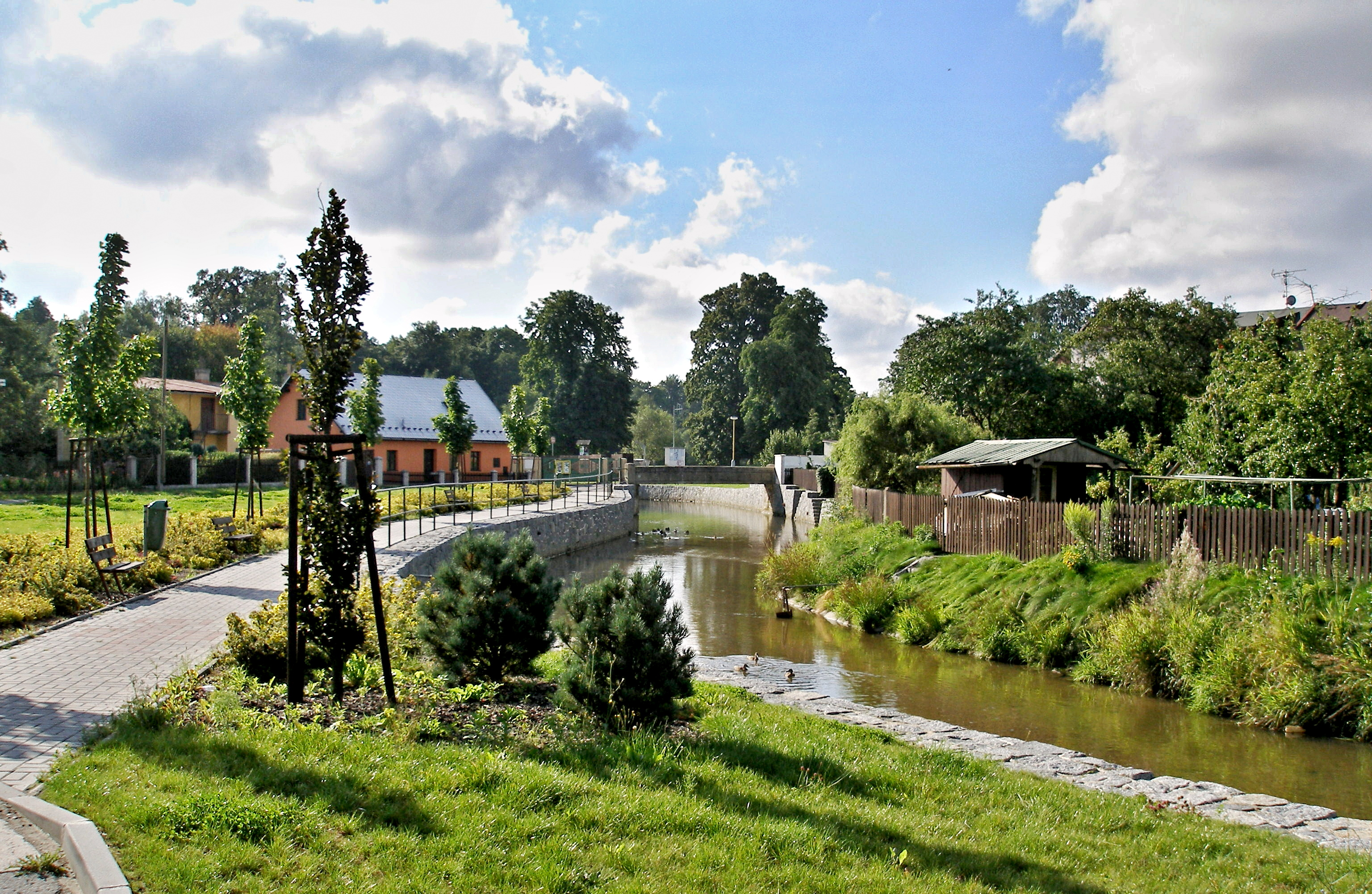 Nábřeží Panenského potoka z ulice V lukách, Mimoň